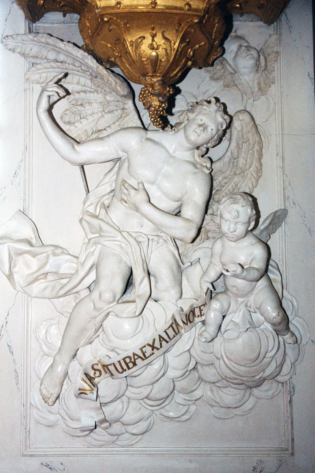 Kanzel der Hofkapelle Hubertusburg